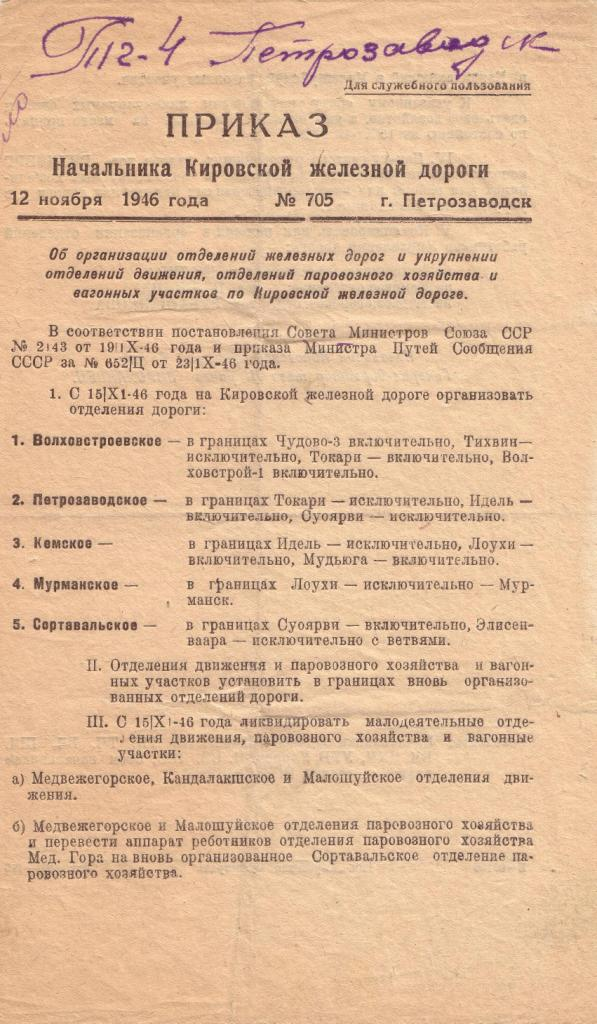 Приказ №705 от 12 ноября 1946 г. Начальника Кировской железной дороги генерал-директора тяги 3 ранга Вольдемара Матвеевича Виролайнена "Об организации отделений железных дорог и укрупнении отделений движения, отделений паровозного хозяйства и вагонных участков по Кировской железной дороге".